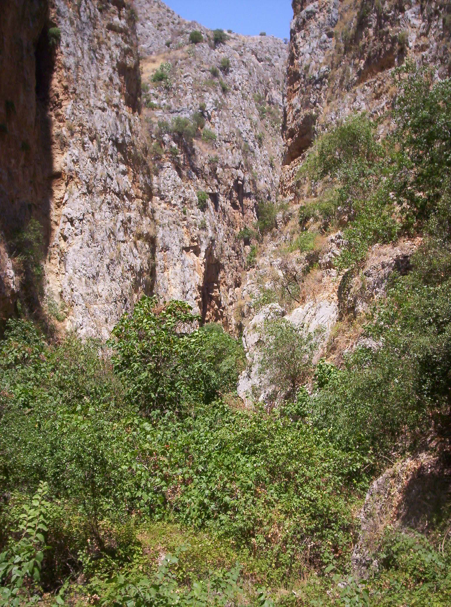 Le gole della Tardara formate dal fiume Carboj